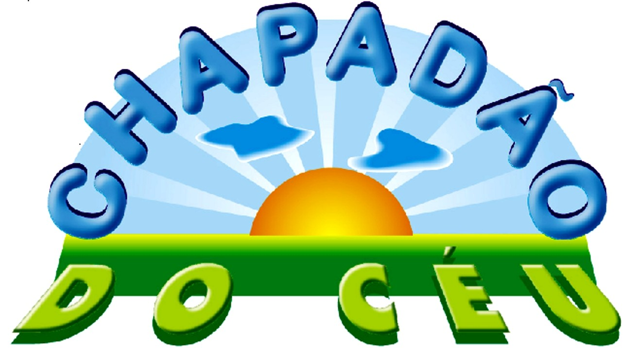 Bandeira de Chapadão do Céu, Goiás, Brasil.